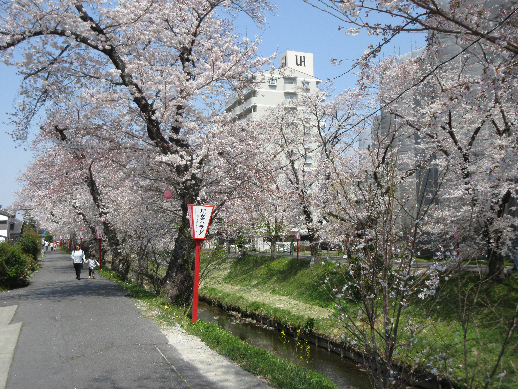 伊賀川桜堤。岡崎市稲熊町にて撮影。